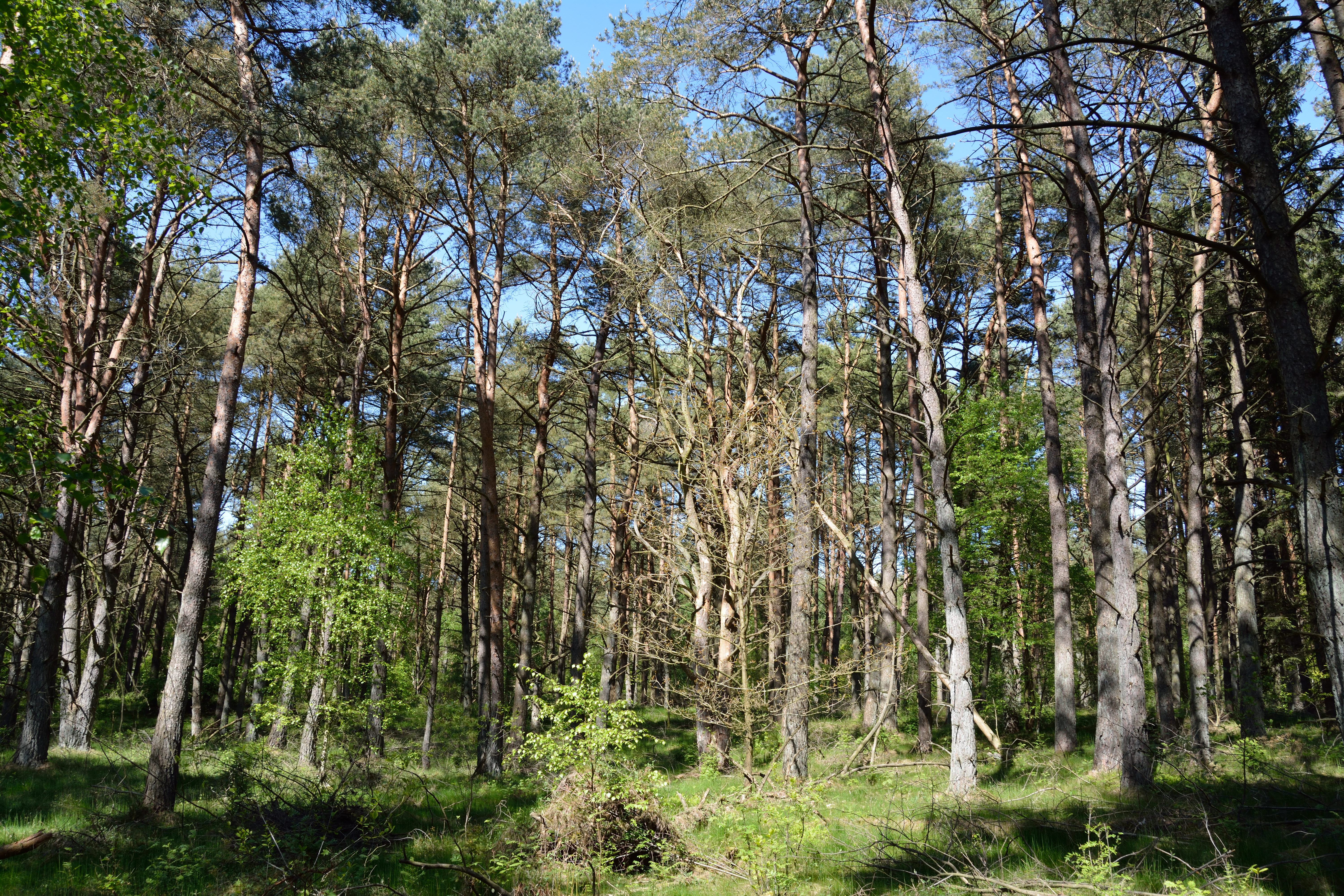 Naturschutzgebiet im Kreis Segeberg Impressionen aus dem Gebiet "Barker Heide"